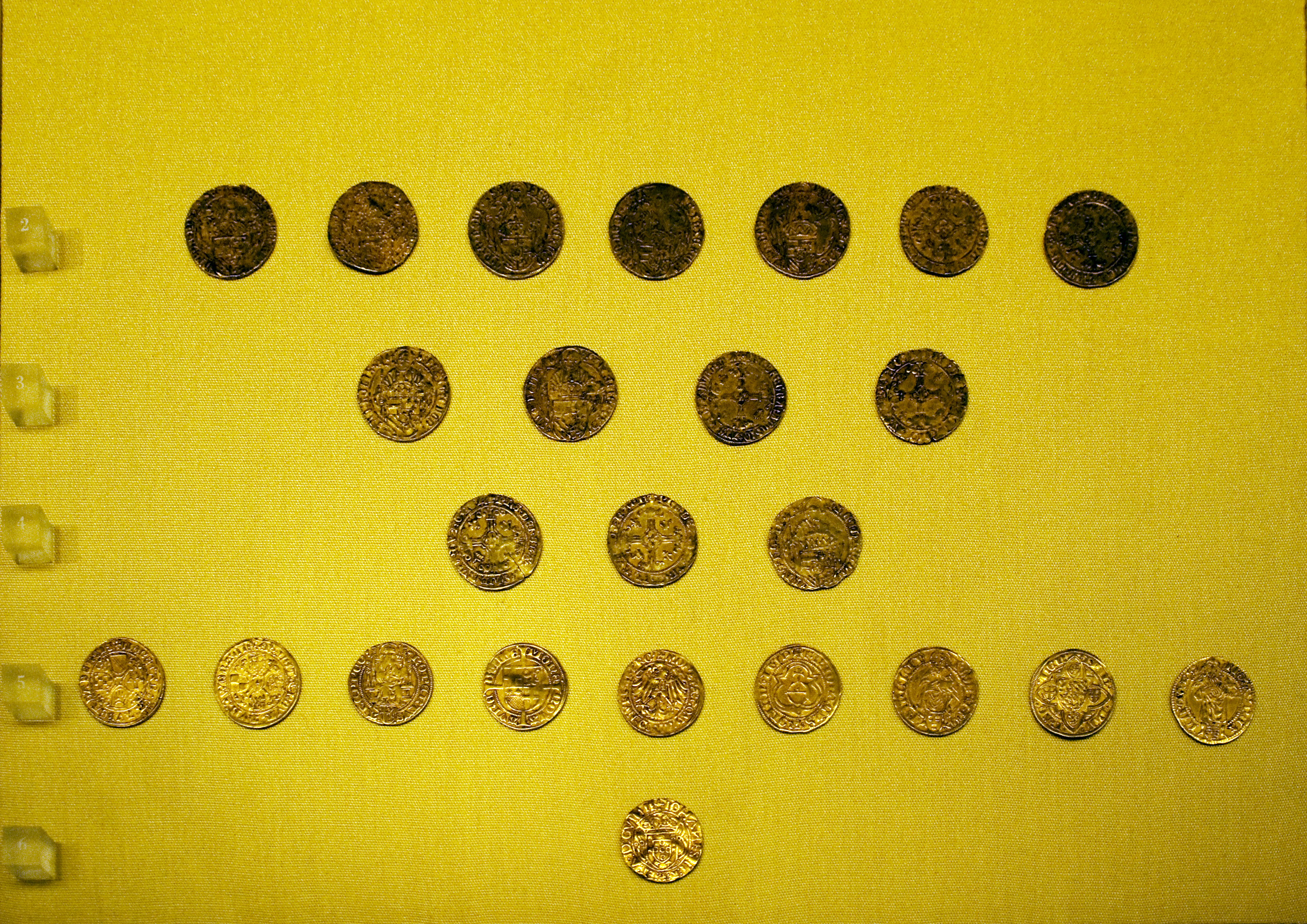 Numismatisch kabinet, Teylers Museum, Haarlem